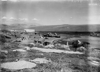 ירושלים - כפר מלחה - נוף מלחה